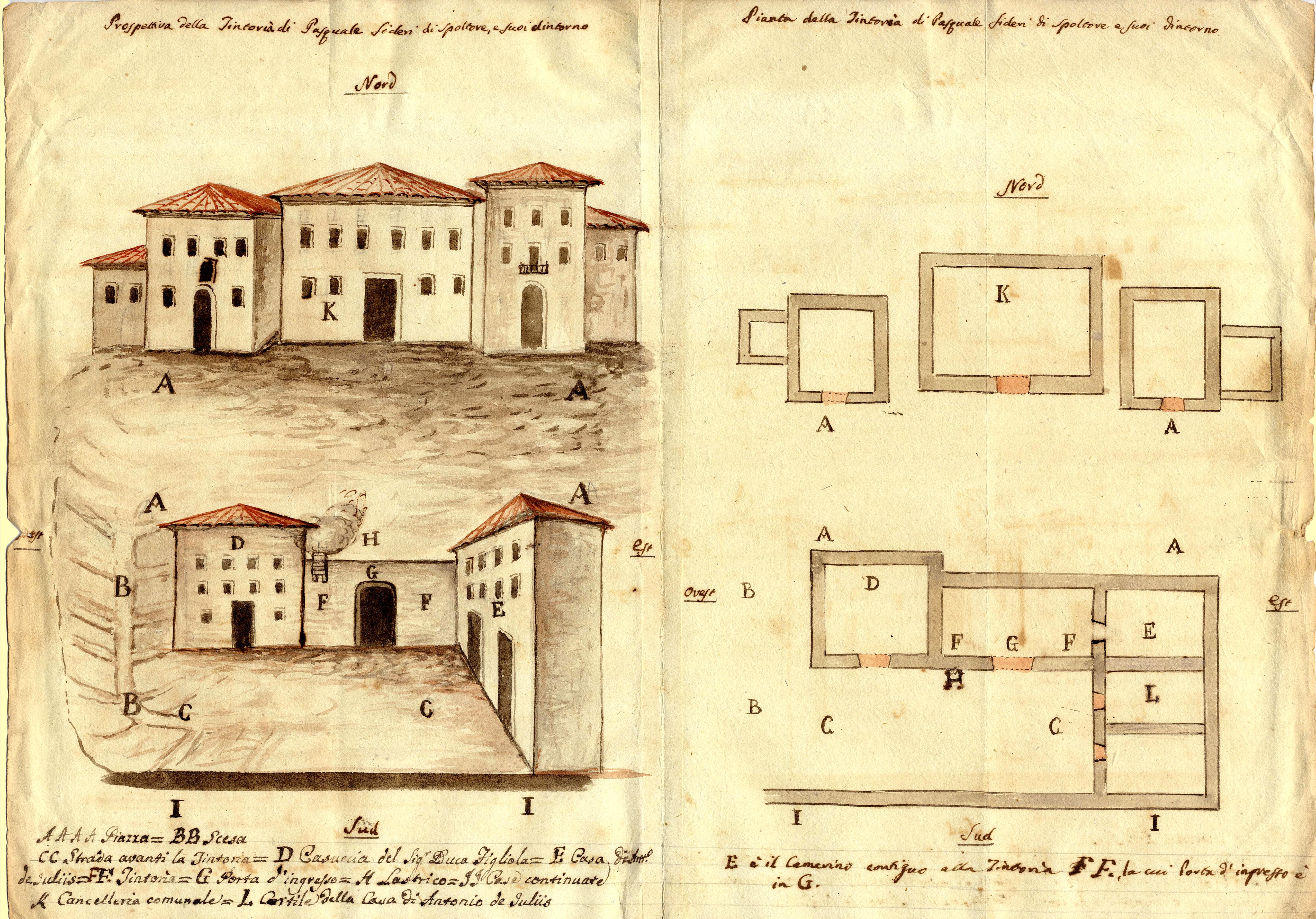 Due prospetti con le relative piante della tintoria di Pasquale Sideri, Spoltore (PE) 1832 (AS Teramo, Fondo Intendenza Borbonica, b. 230, fasc. 180)